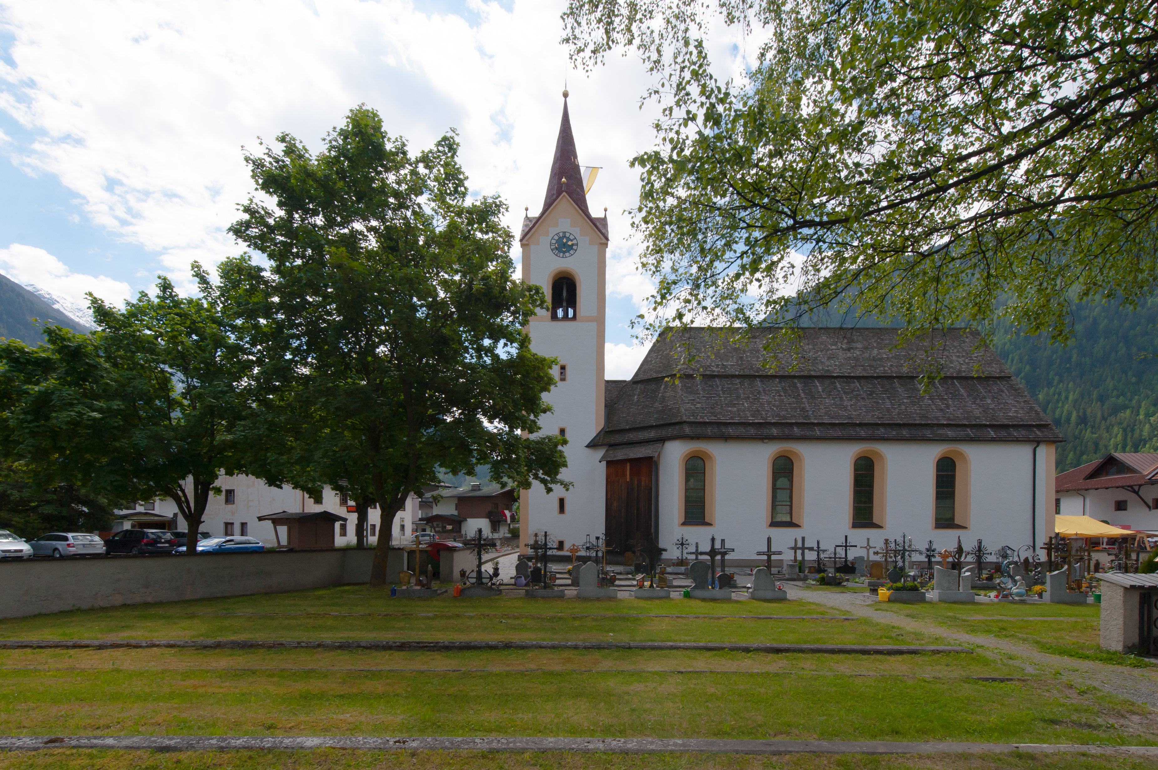 Wiki takes Nordtiroler Oberland: Kirchplatz Huben, Kirche und Friedhof This media shows the remarkable cultural object in the Austrian state of Tyrol listed by the Tyrolean Art Cadastre with the ID 20493. (on tirisMaps, pdf, more images on Commons)